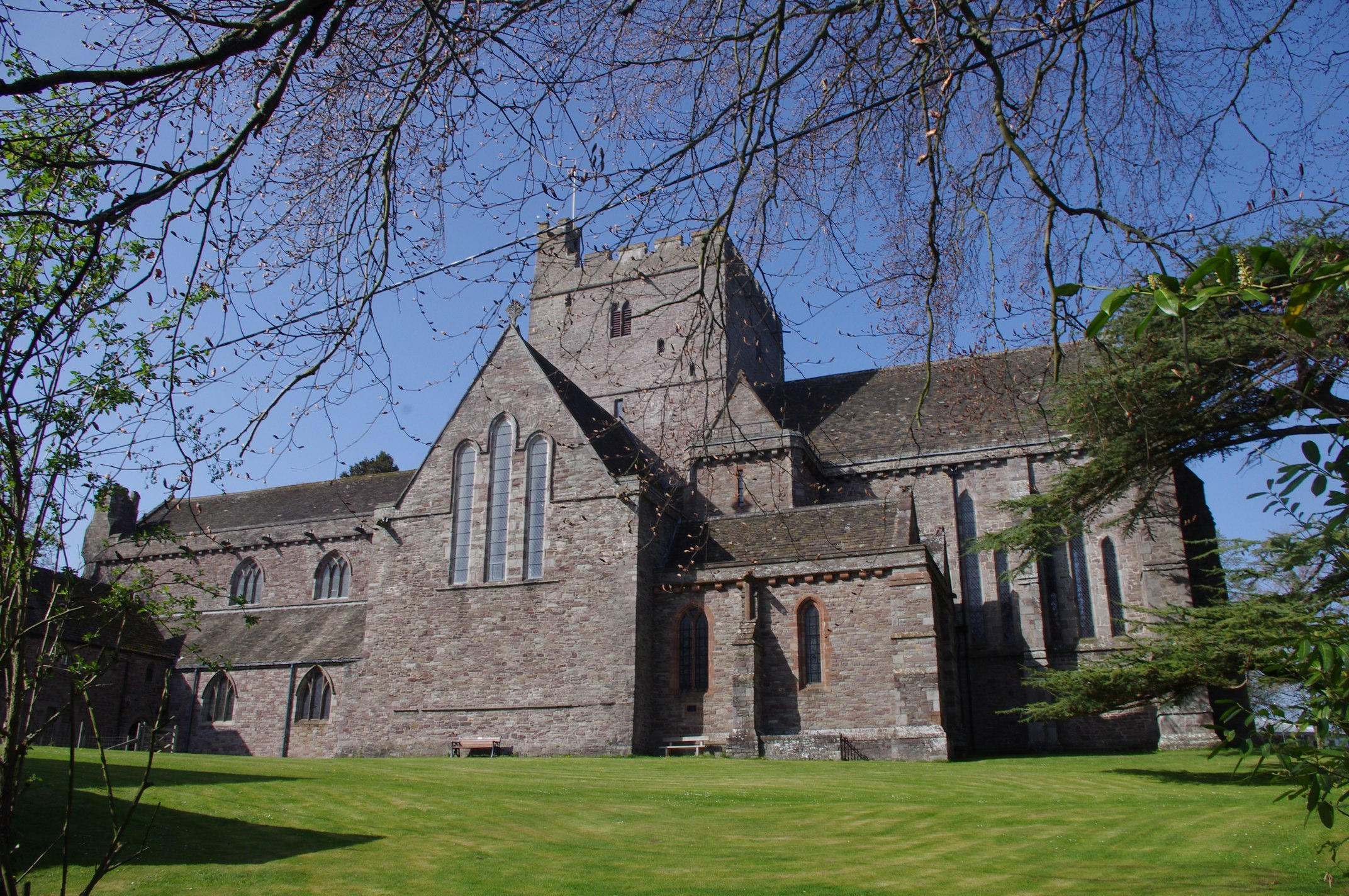 Powys, Wales